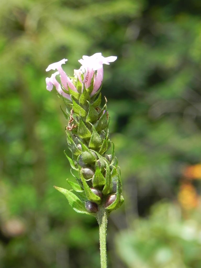 Lantana trifolia L. - VERBENACEAE - Parque Olhos D'Água - Brasília - Distrito Federal - Brasil.